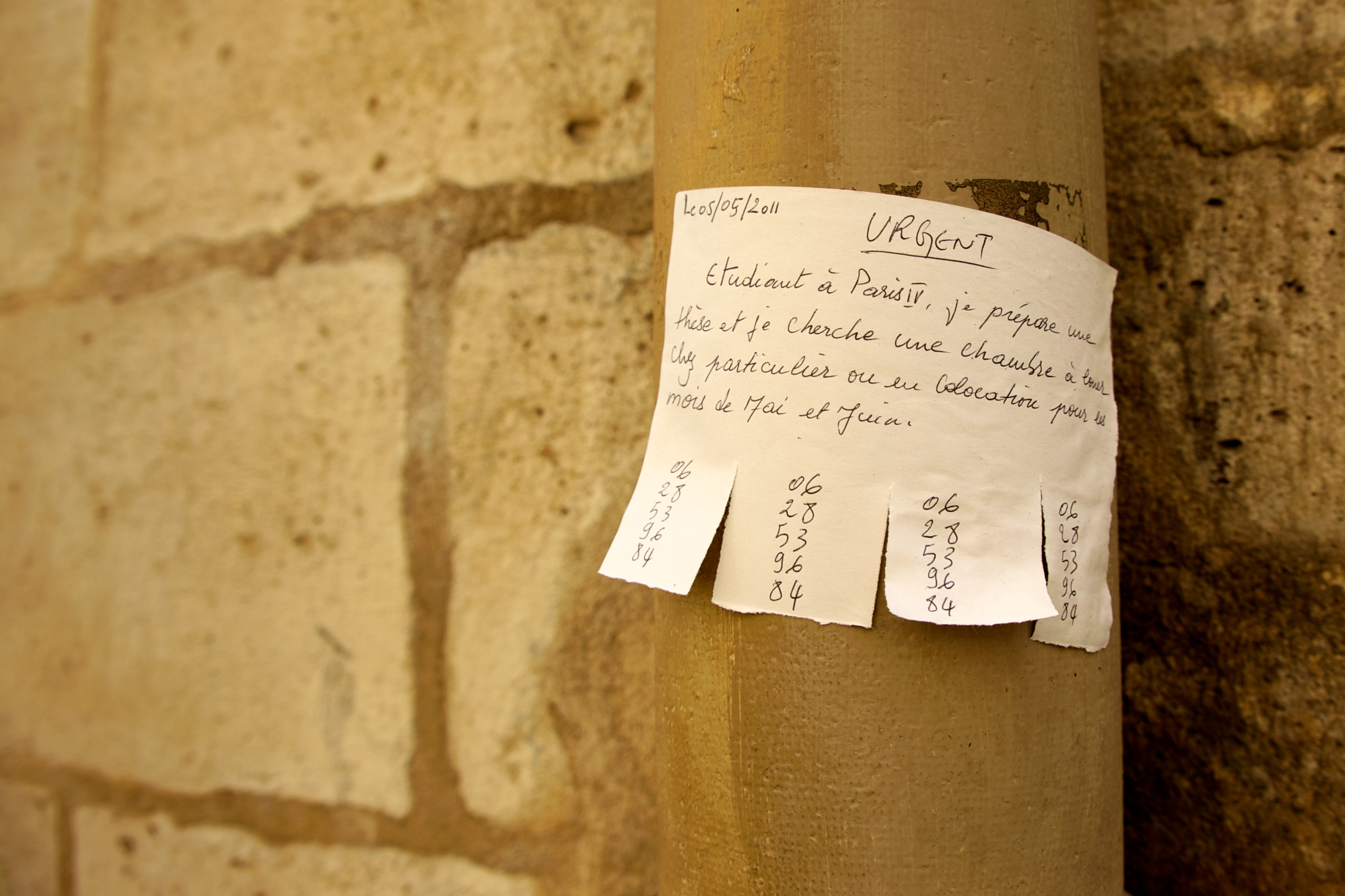 Une petite annonce à Paris. Le 05/05/2011 URGENT Etudiant à Paris IV, je prépare une thèse et je cherche une chambre à louer chez particulier ou eu colocation pour les mois de Mai et Juin.